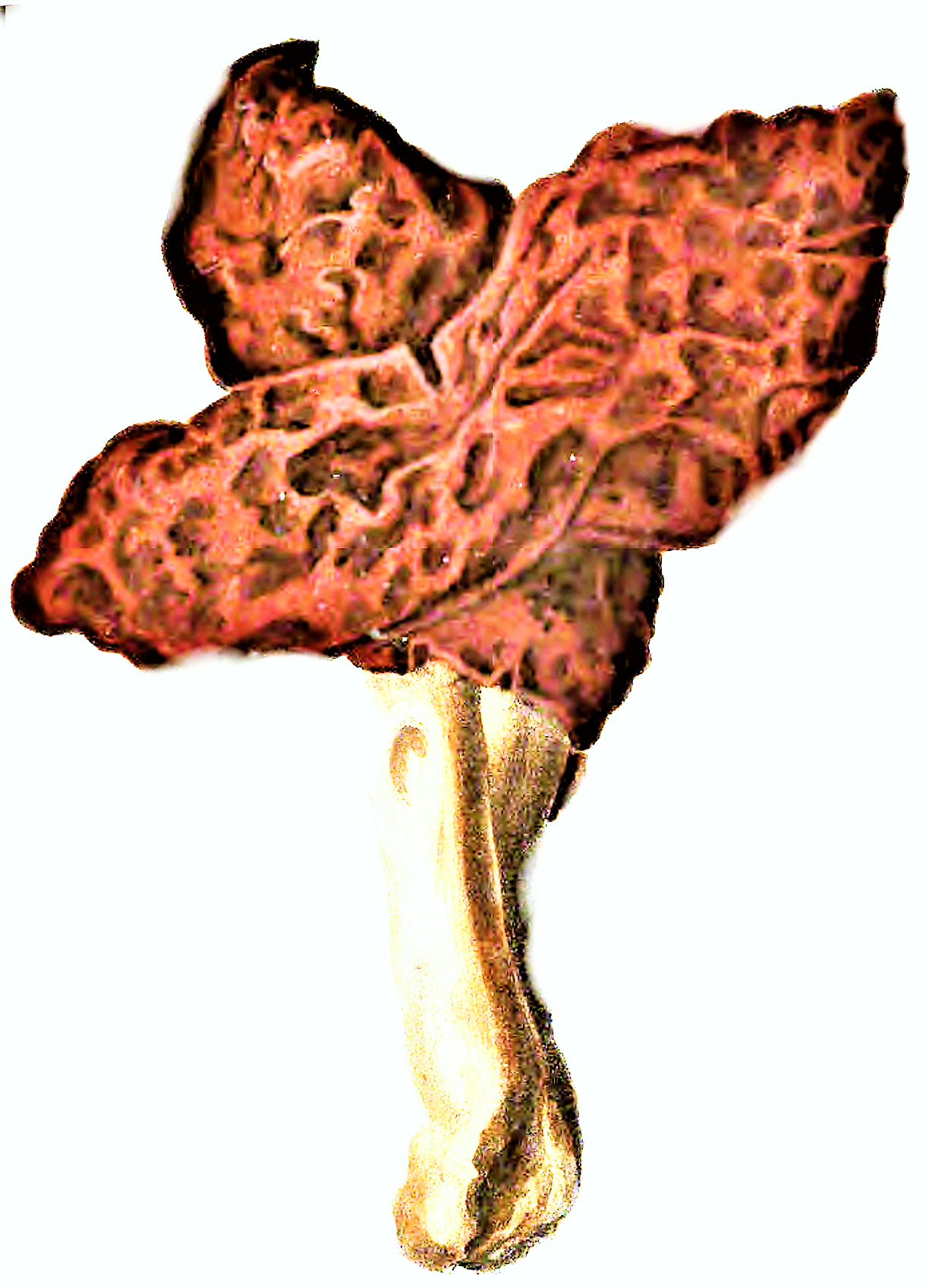 Helvella fastigiata Krombh., 1834, heute Gyromitra fastigiata (Krombh.) Rehm, 1895